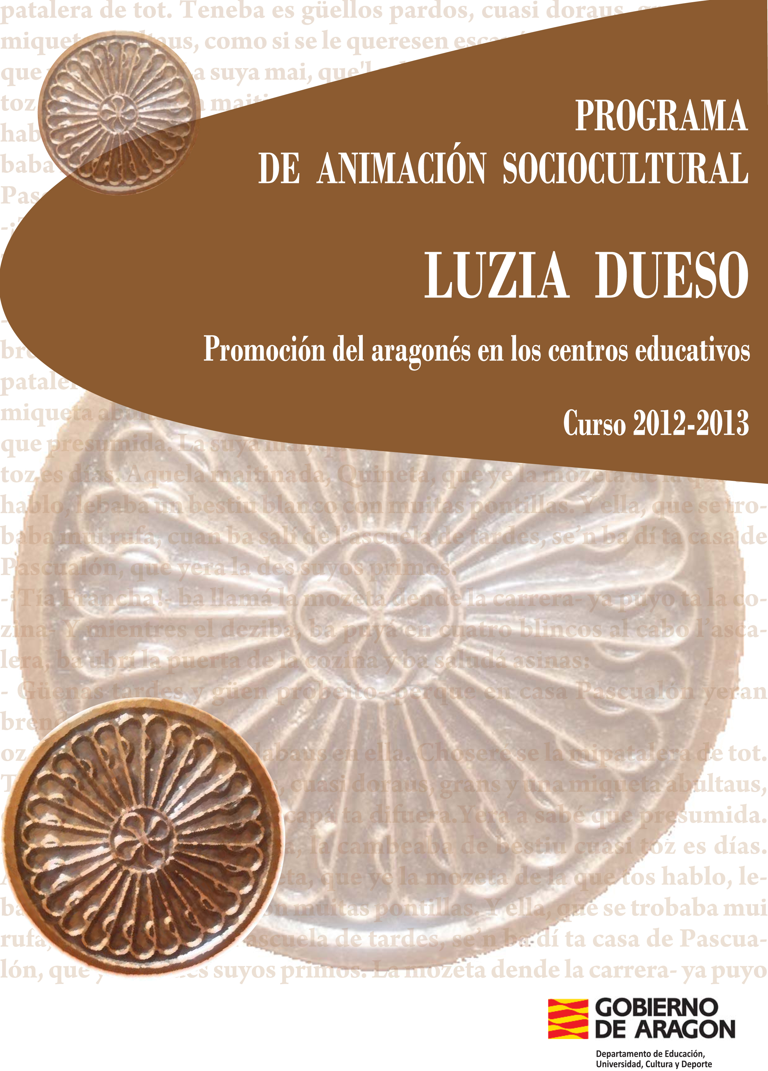 Aragonés: folleto programa Luzia Dueso curso 2012-2013